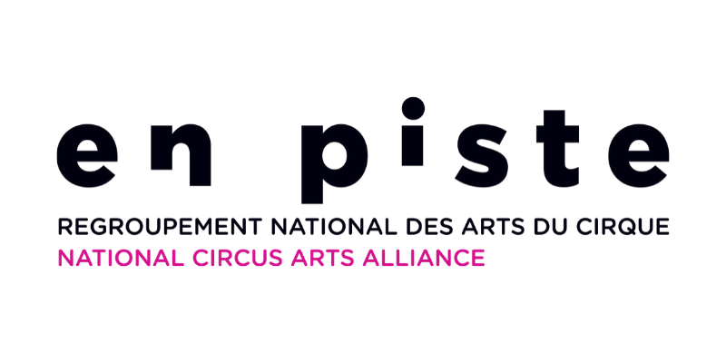 Image de marque 2019